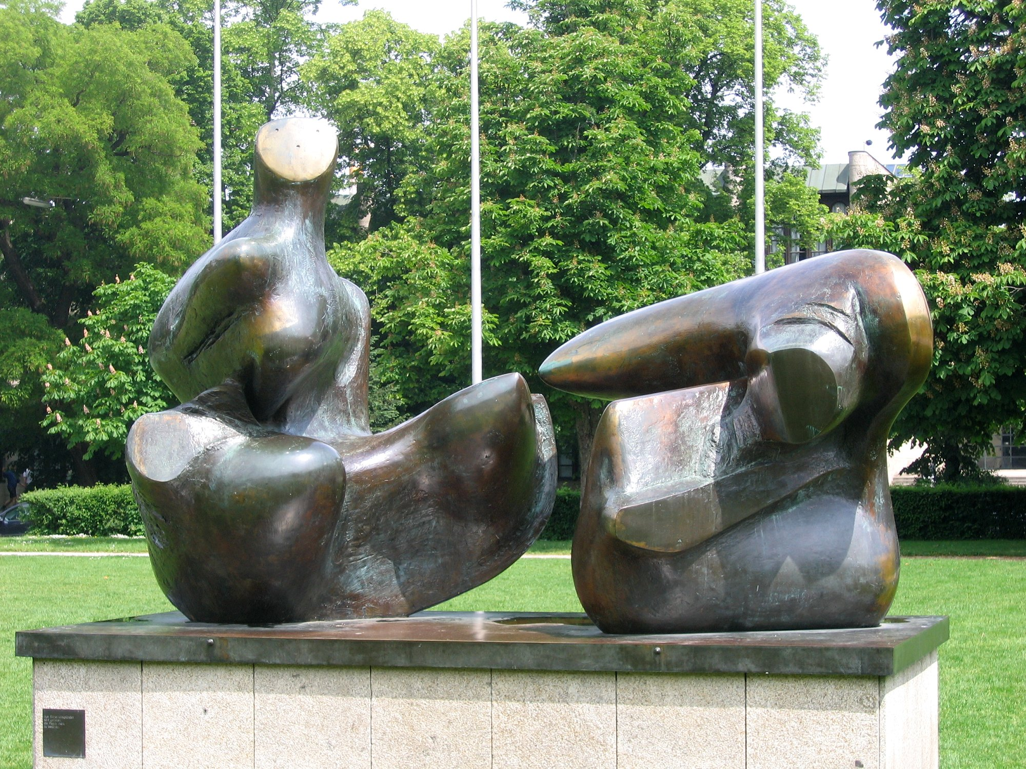 Henry Moore: „Two-Piece Reclining Figure: Points“, 1969-1970, Bronze, vor der Alten Pinakothek in München